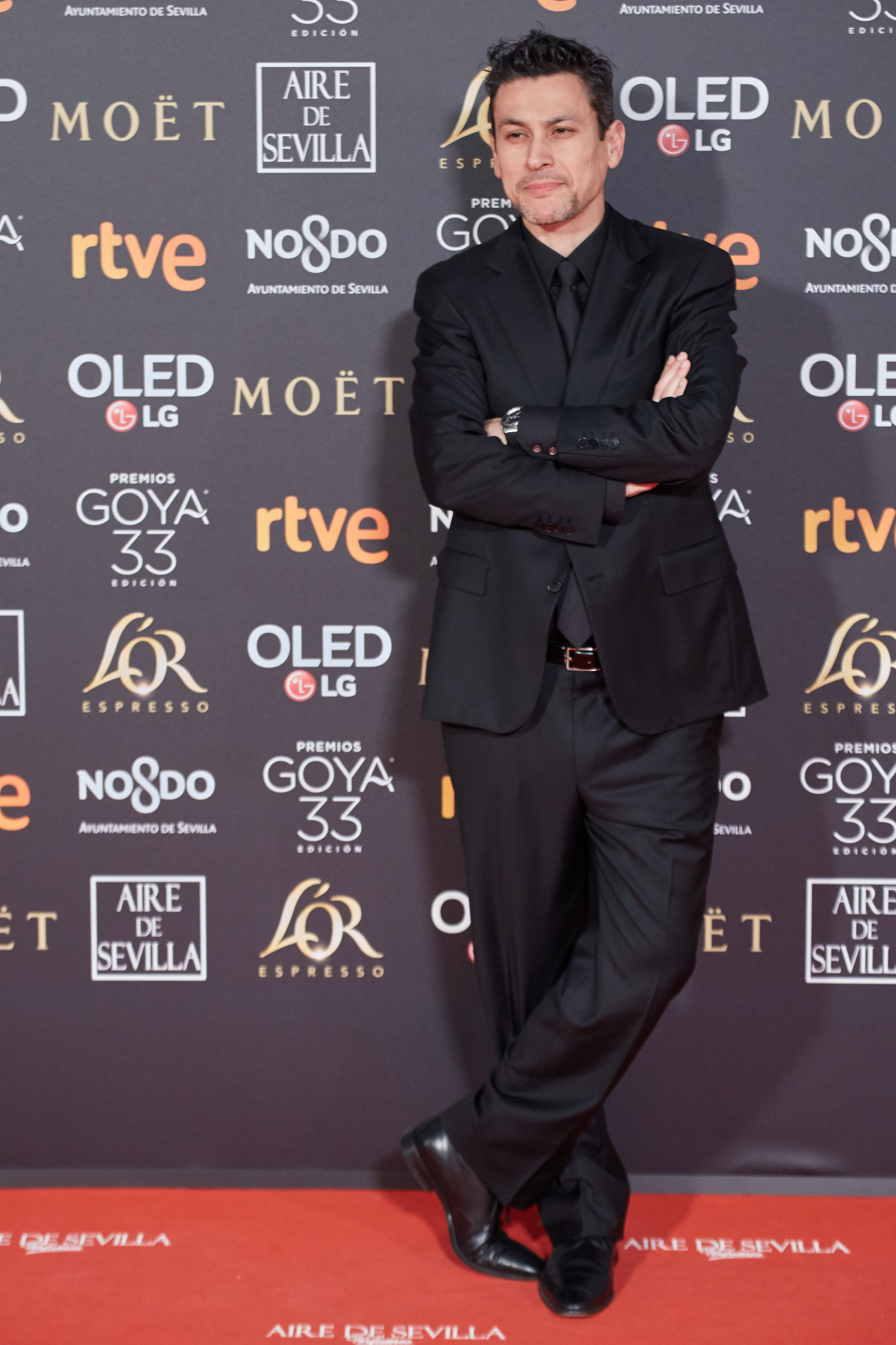 Rodrigo Cortés en la alfombra roja de los Premios Goya celebrados en Sevilla en Febrero 2019